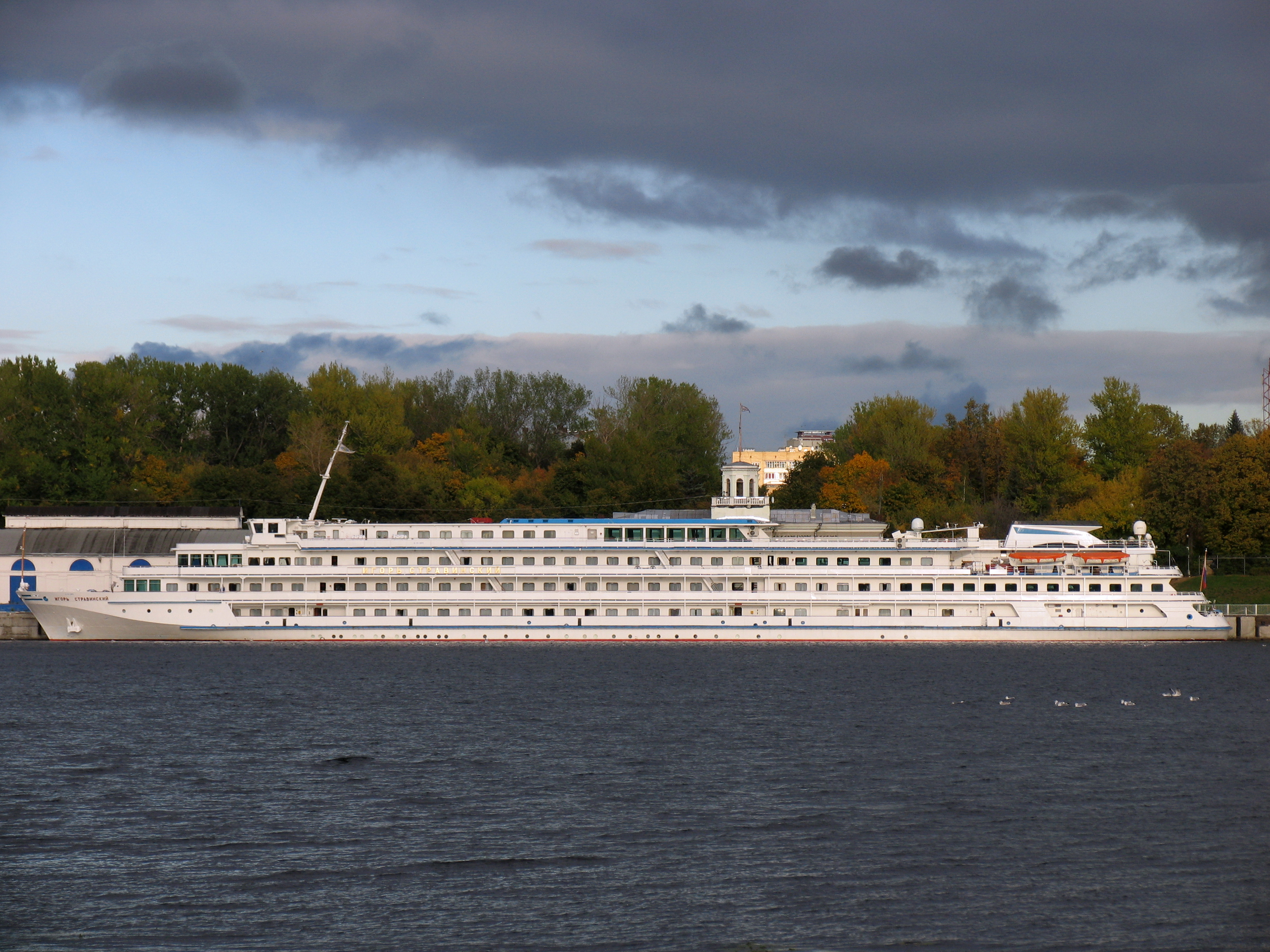 Речное круизное судно "Игорь Стравинский" в Северном речном порту, Москва.